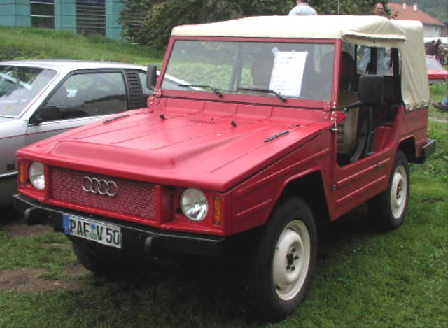 Volkswagen Iltis (with Fake-Audi-emblem)